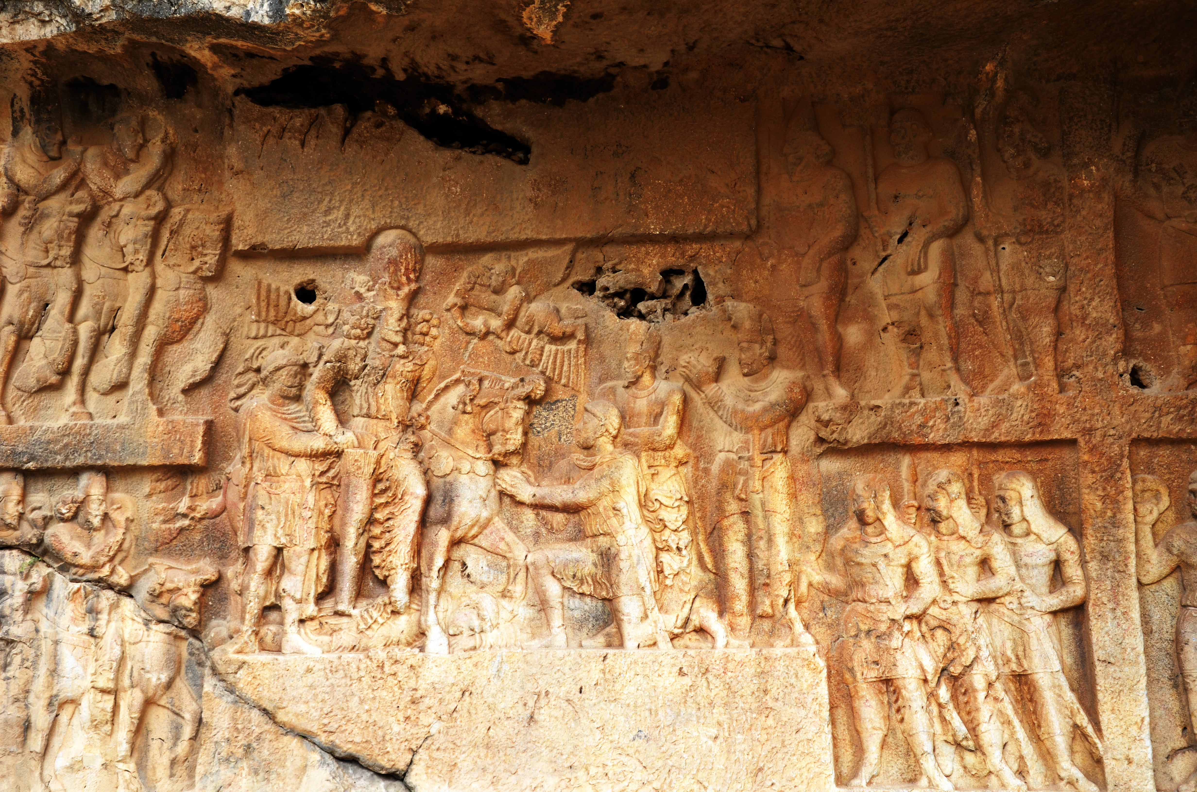 Kazeroun - Tange Chogan